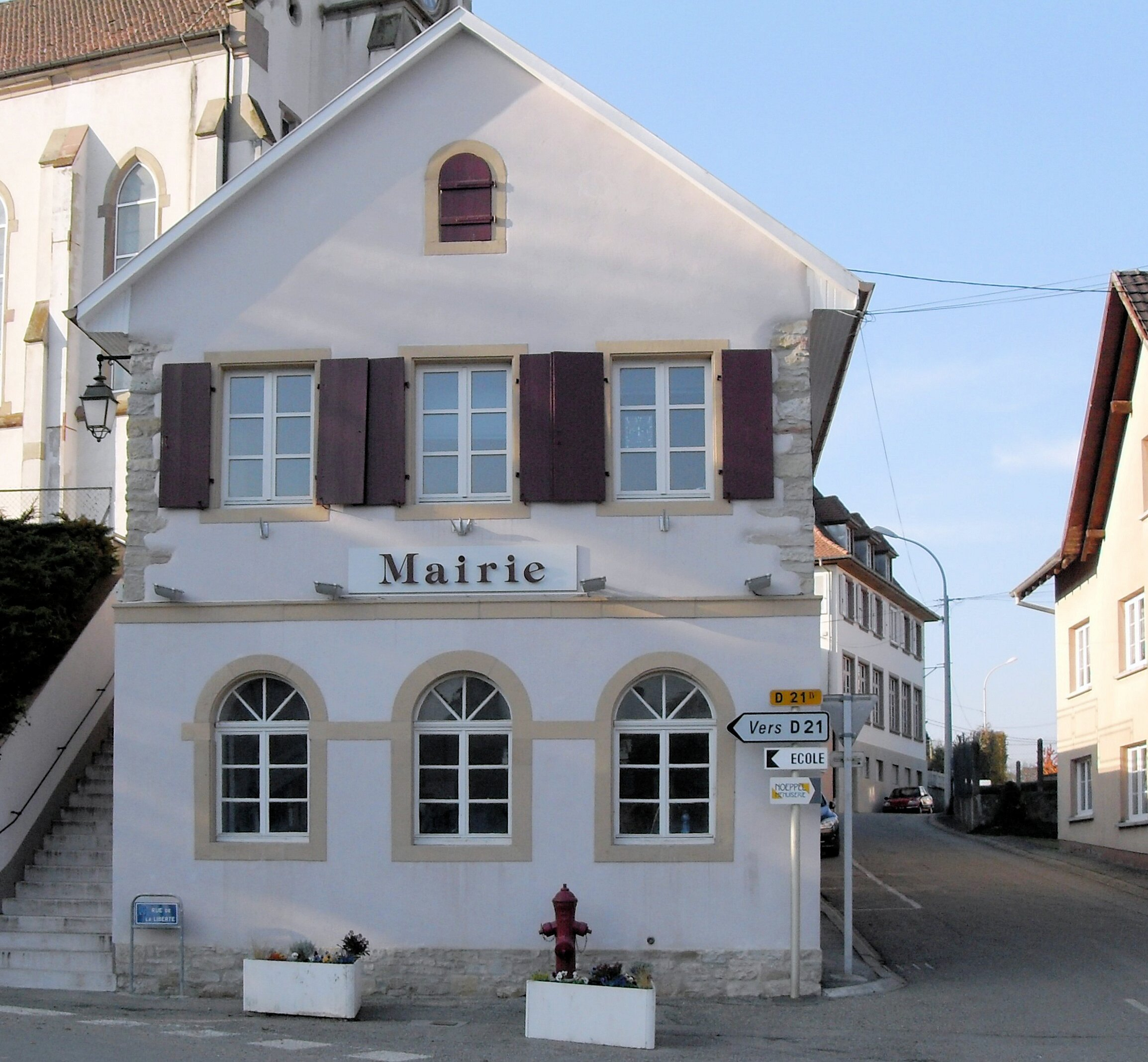 La mairie de Michelbach-le-Haut